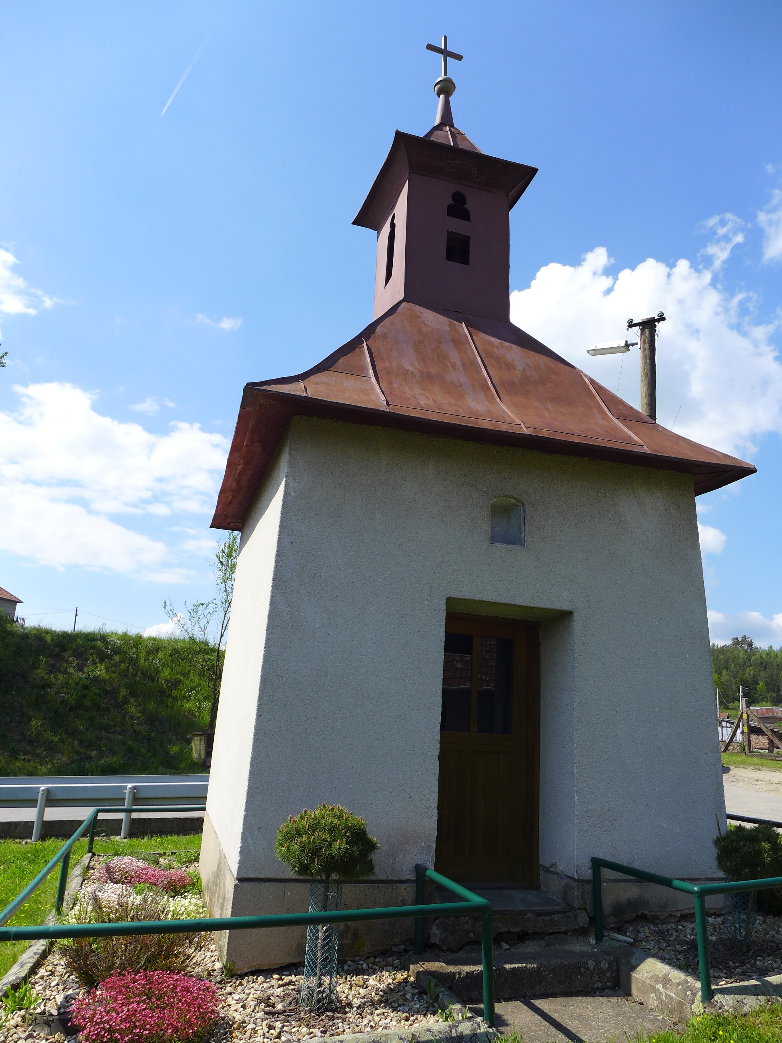 Zvonice, Baliny.